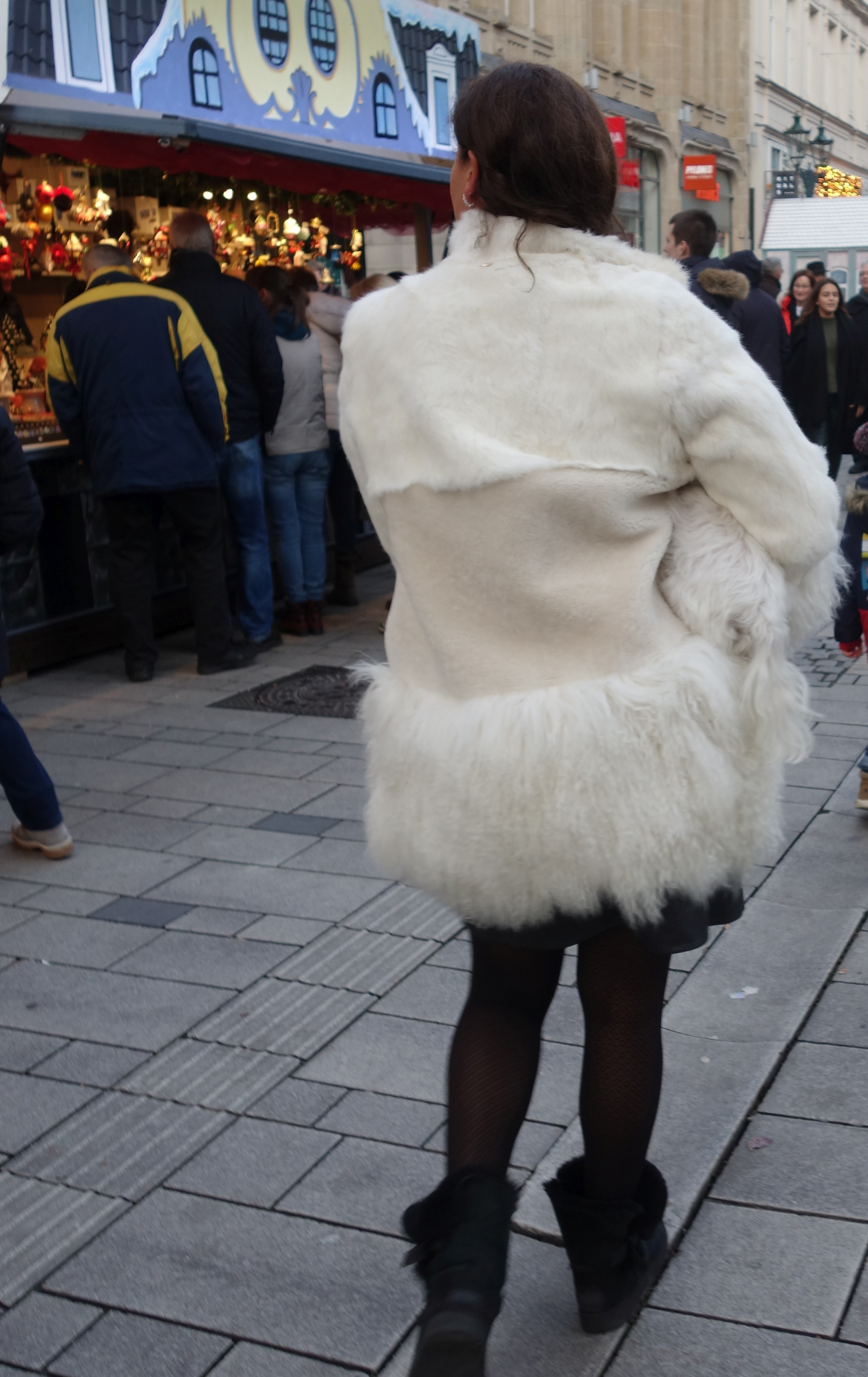 Dame Tibetlammjacke und Pudel. Düsseldorf, Weihnachtsmarkt 2019.